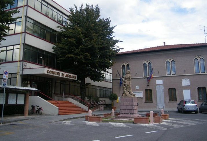 Piazza della Resistenza. Di fronte il Comune vecchio, dove vi sono gli uffici Urp e la stanza del consiglio comunale. A sinistra il palazzo comunale nuovo.